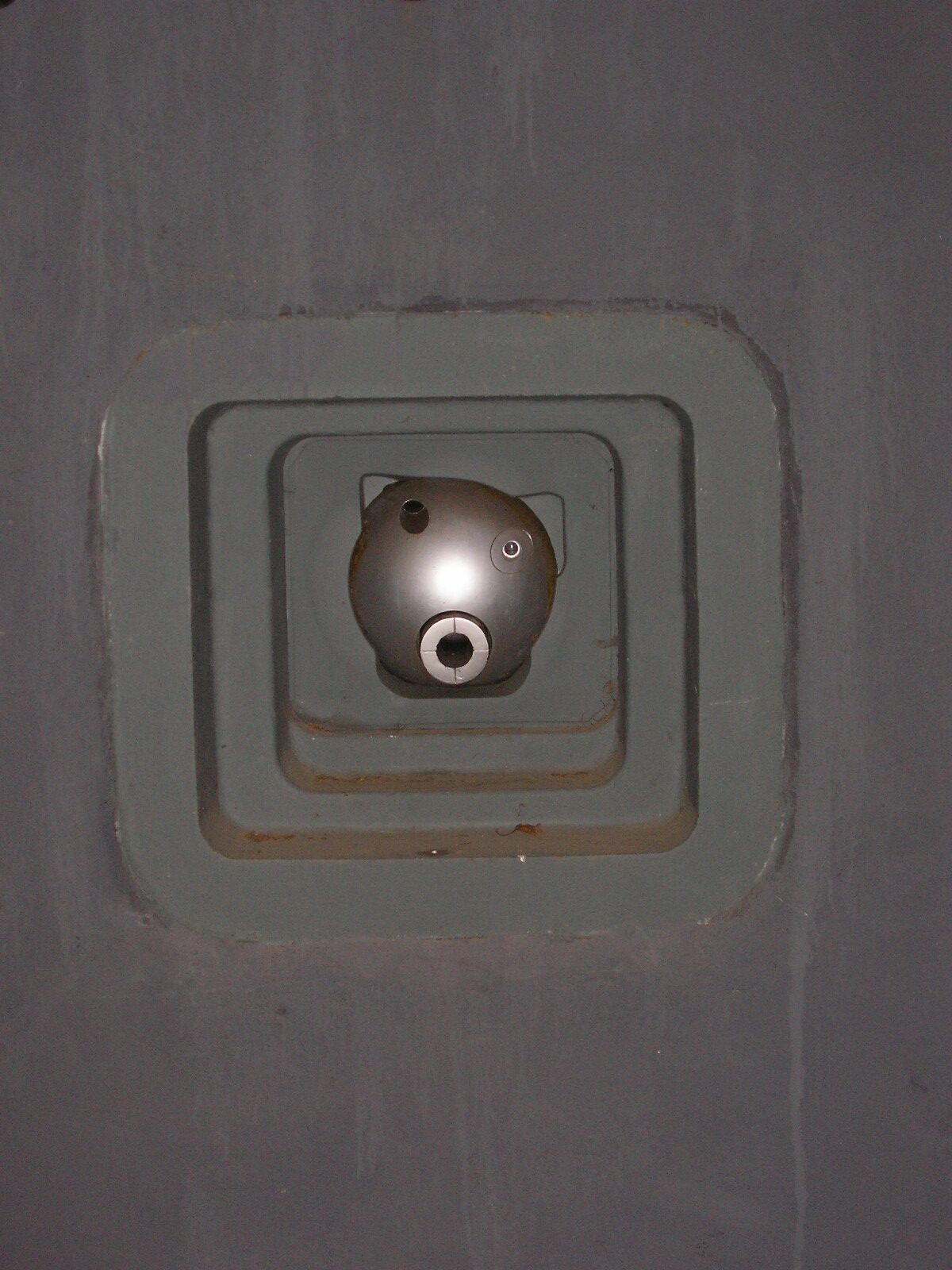 Střílna zbraně L1 (4 cm kanon vz. 36) na srubu K-S 5 U potoka